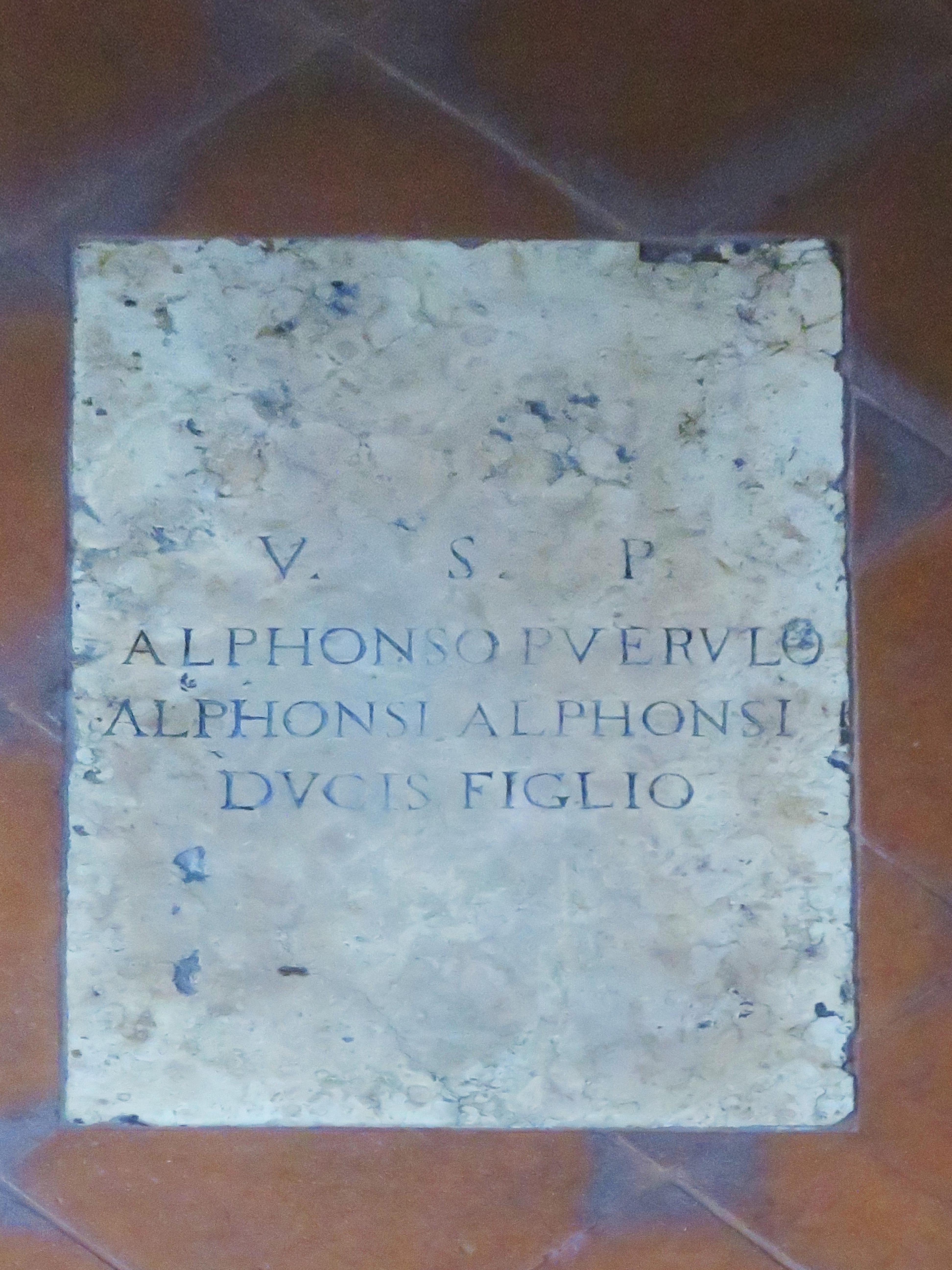 Tombe casata degli Estensi